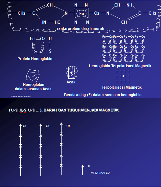 Struktur Hemoglobin (atas). Polarisasi magnetik (bawah).